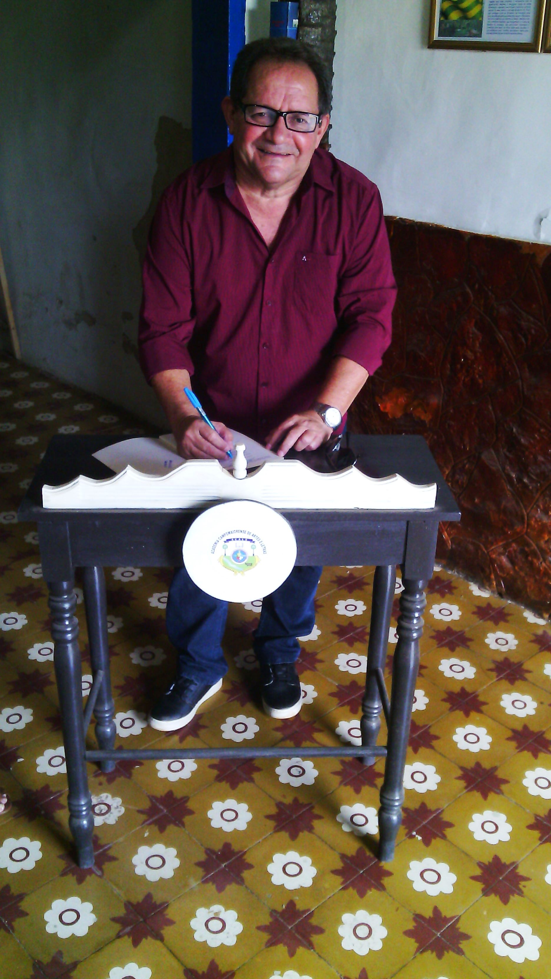 Benício Barros Alves, um político, com atuação no Piauí, que foi o primeiro prefeito do município de Nossa Senhora de Nazaré (Piauí).